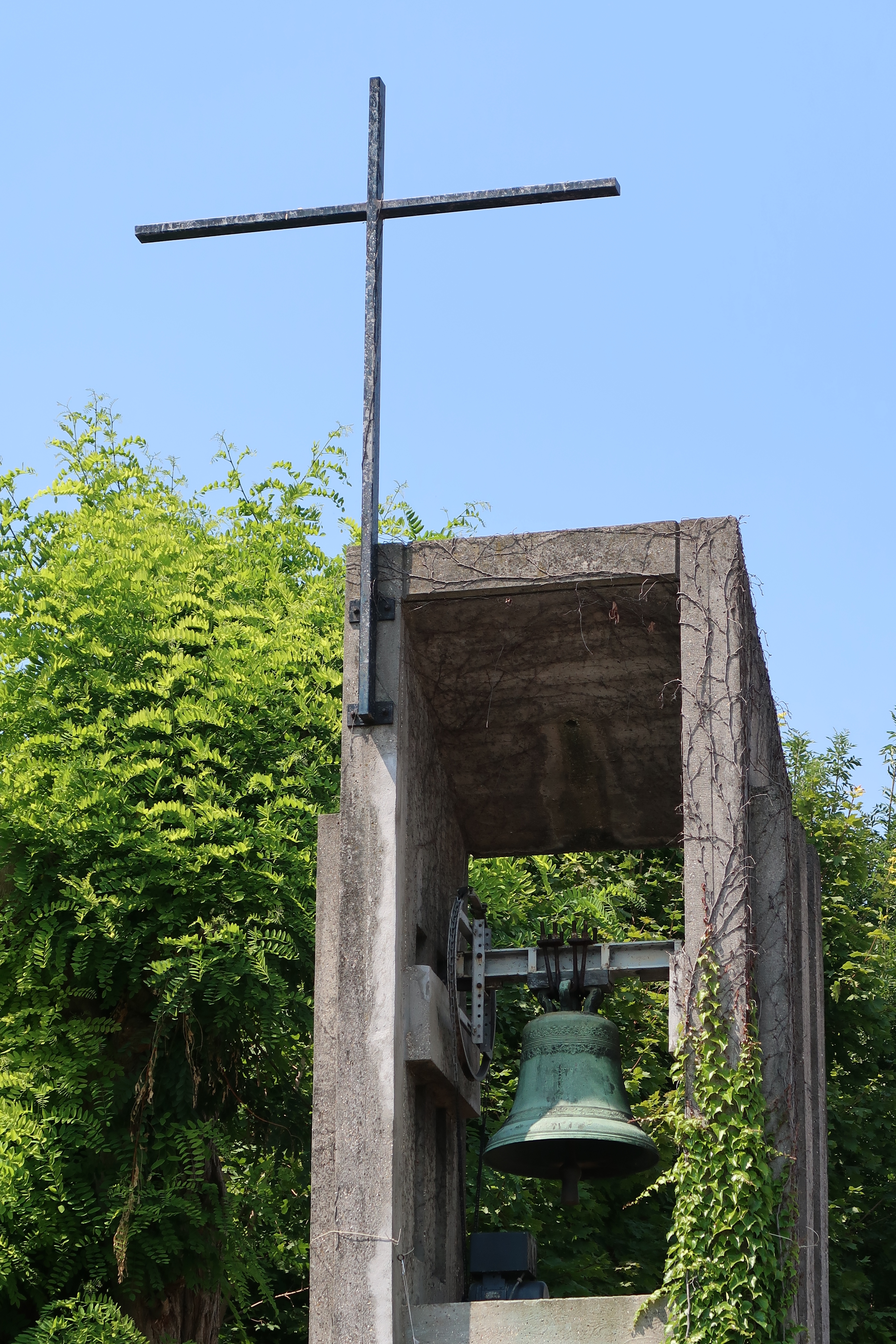 Clocher de l'église Notre-Dame-de-la-Salette de Suresnes, 1 chemin des Hocquettes (Hauts-de-Seine).